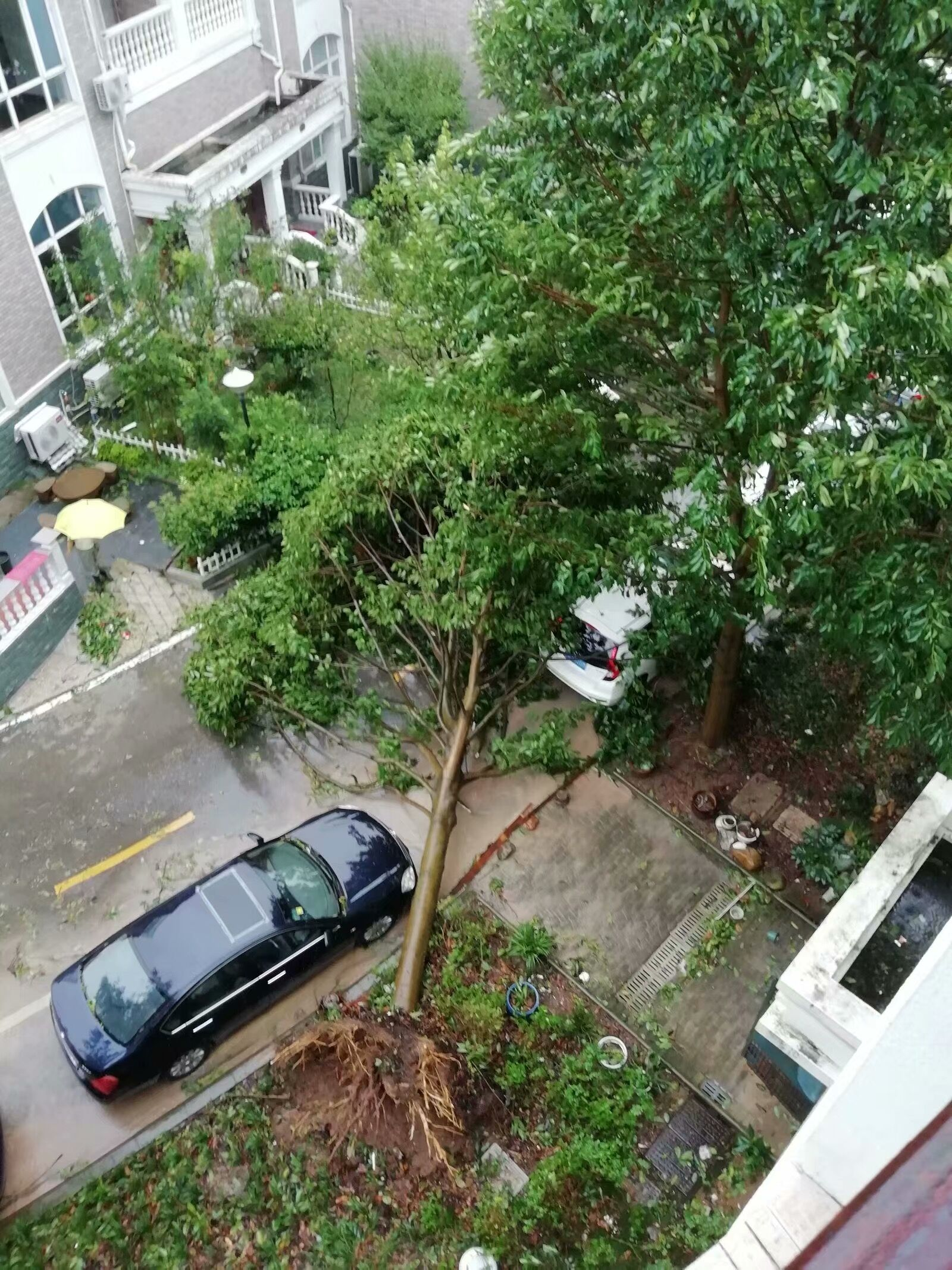 中文（中国大陆）: 2019年台风利奇马将台州市仙居县锦绣明珠小区的树连根拔起。